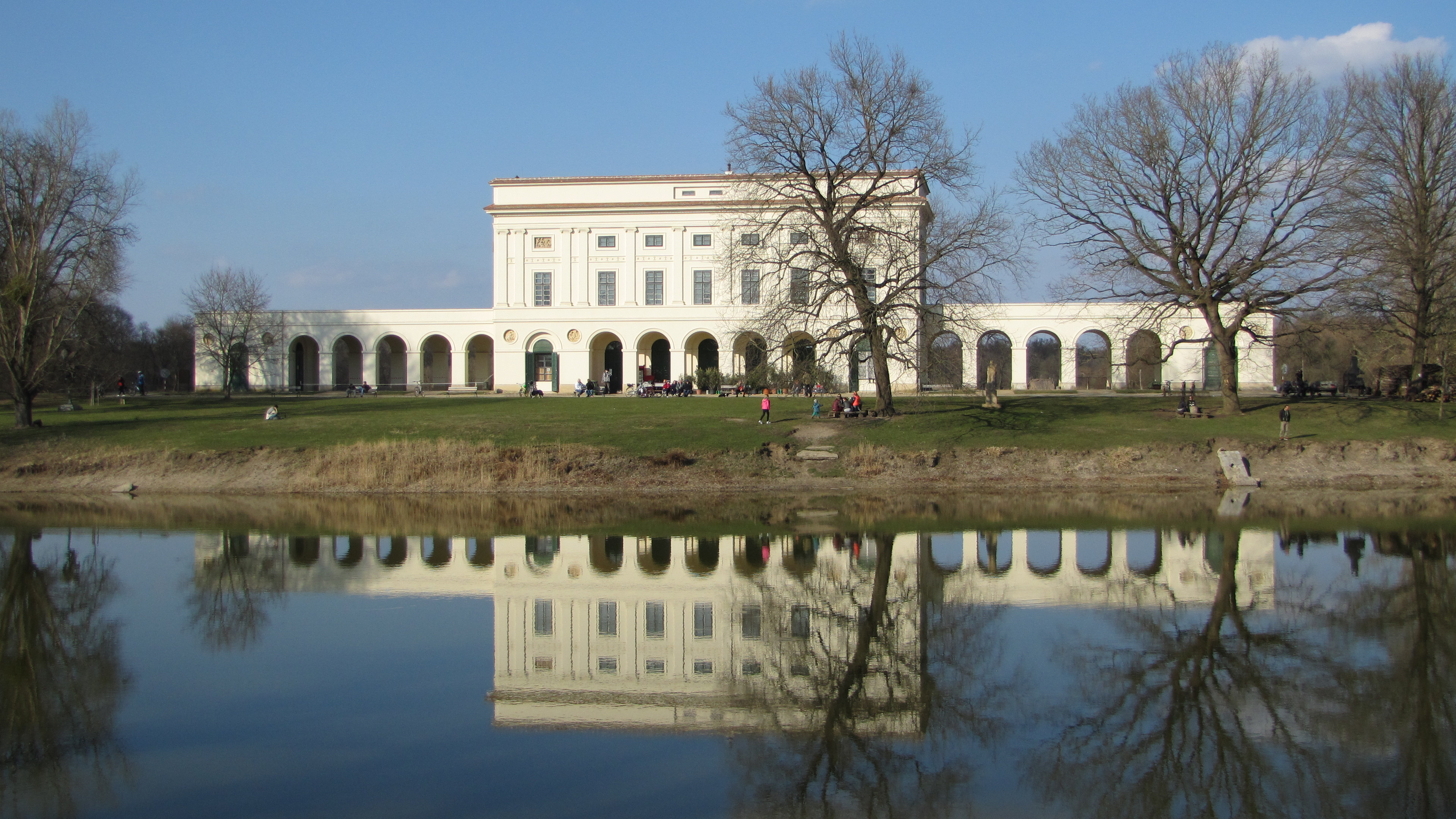 Zámek Pohansko u Břeclavi